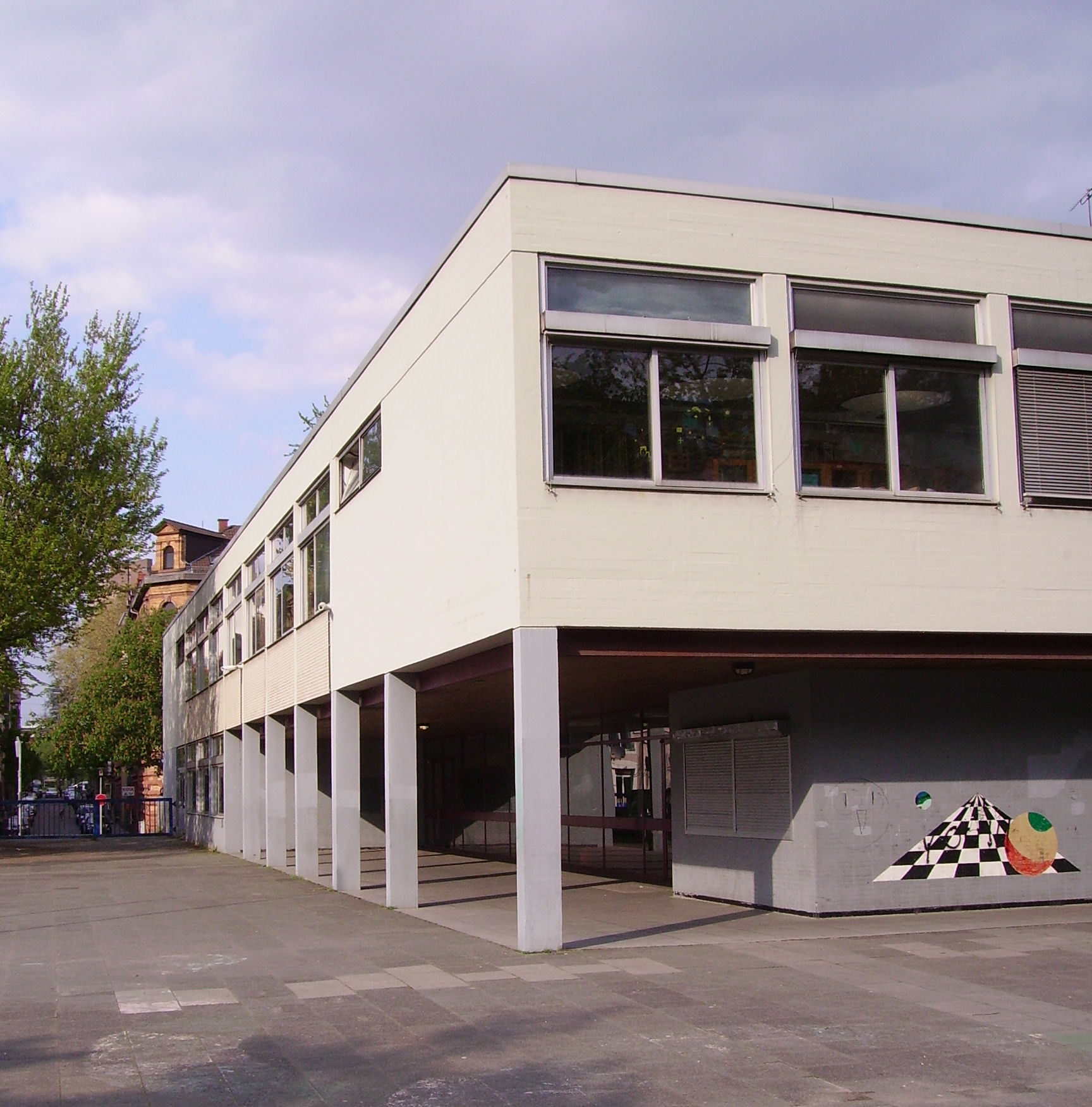 School in Mannheim, Germany